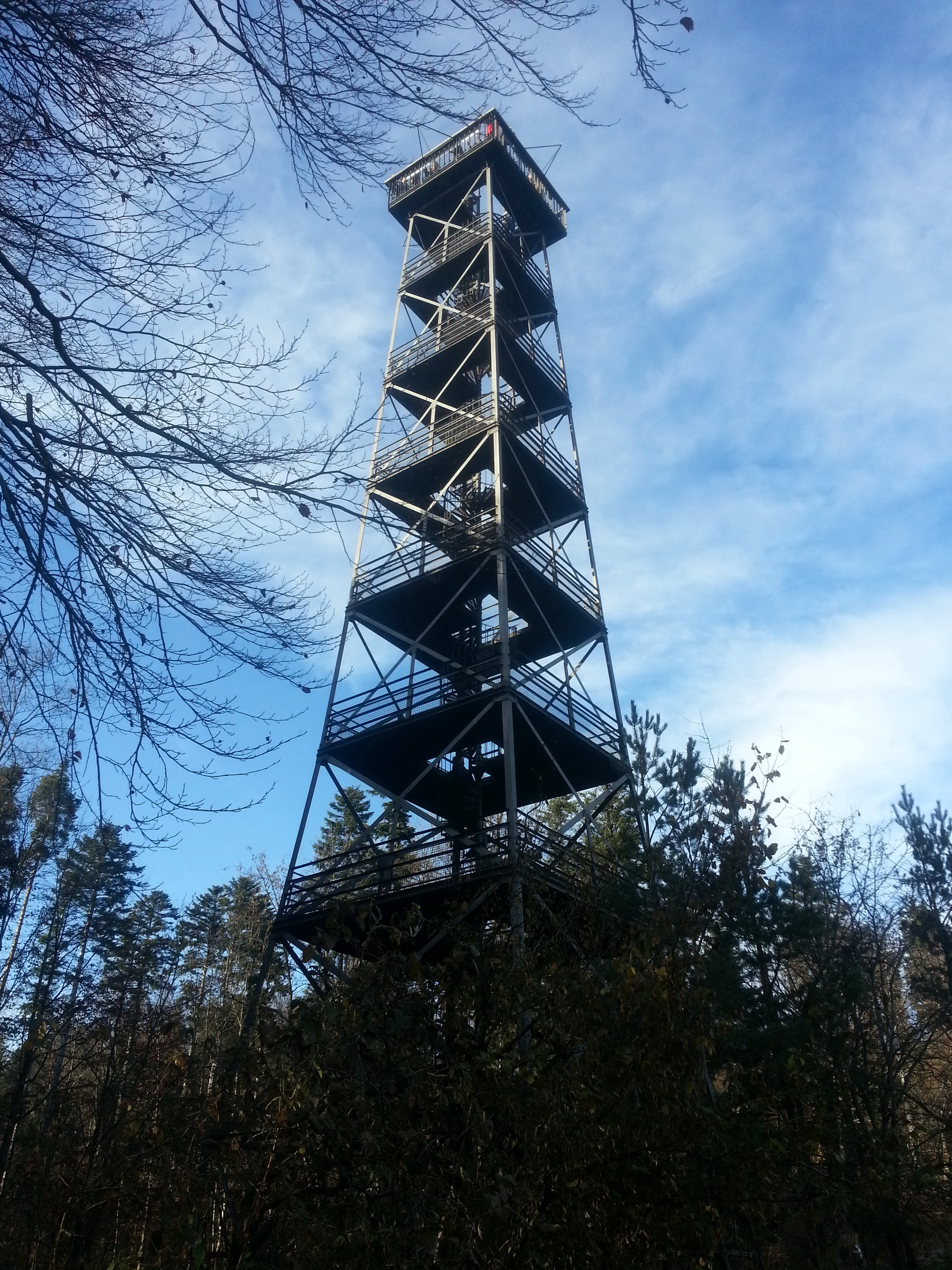 Aussichtsturm Pfannenstiel